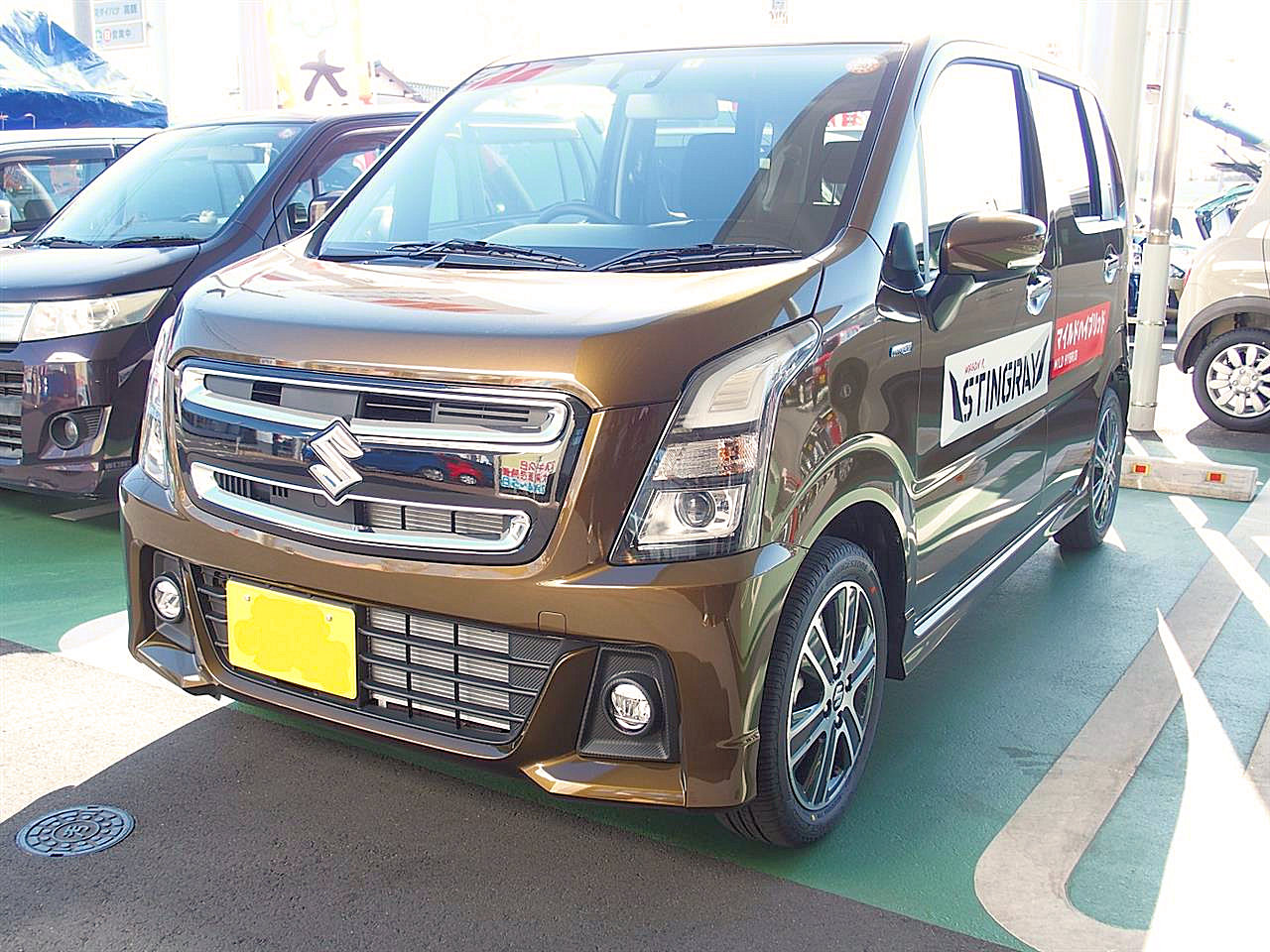 スズキ・ワゴンR スティングレーHYBRID T